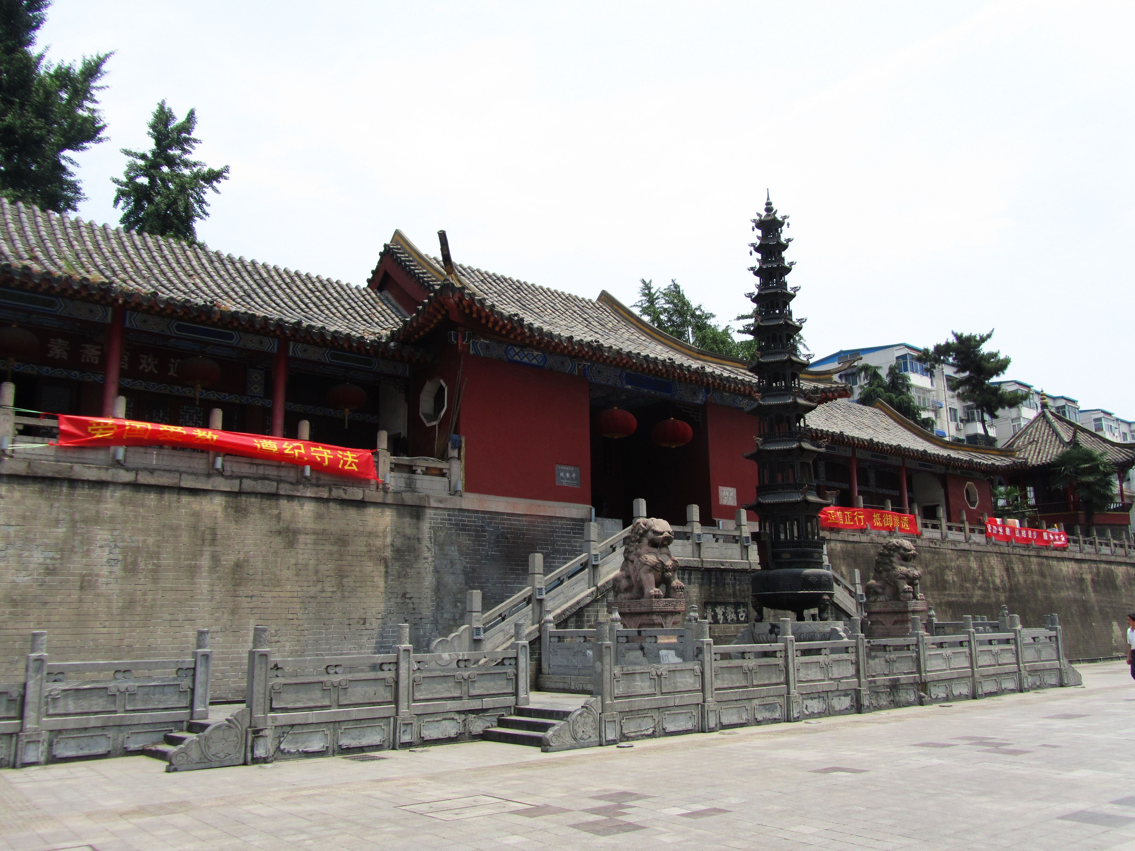 合肥明教寺，侧面。